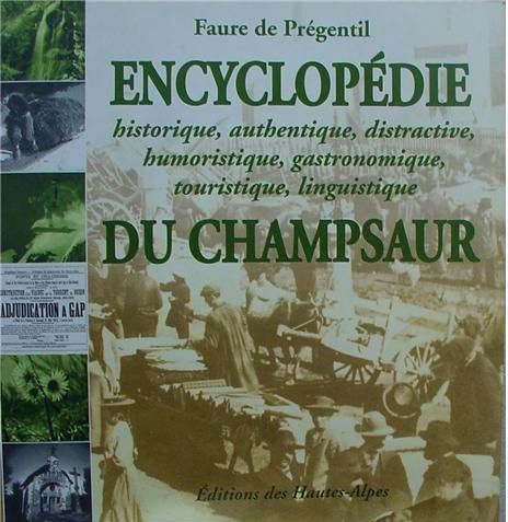 Livre de Robert Faure intitulé "Encyclopedie du Champsaur"